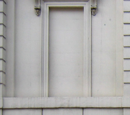 Blindering